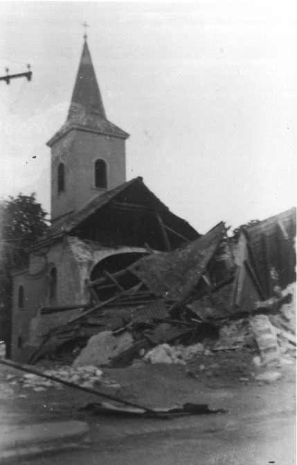 Zerbombte Servatiuskirche in Wien, Bild von 1944 andere Versionen: ...